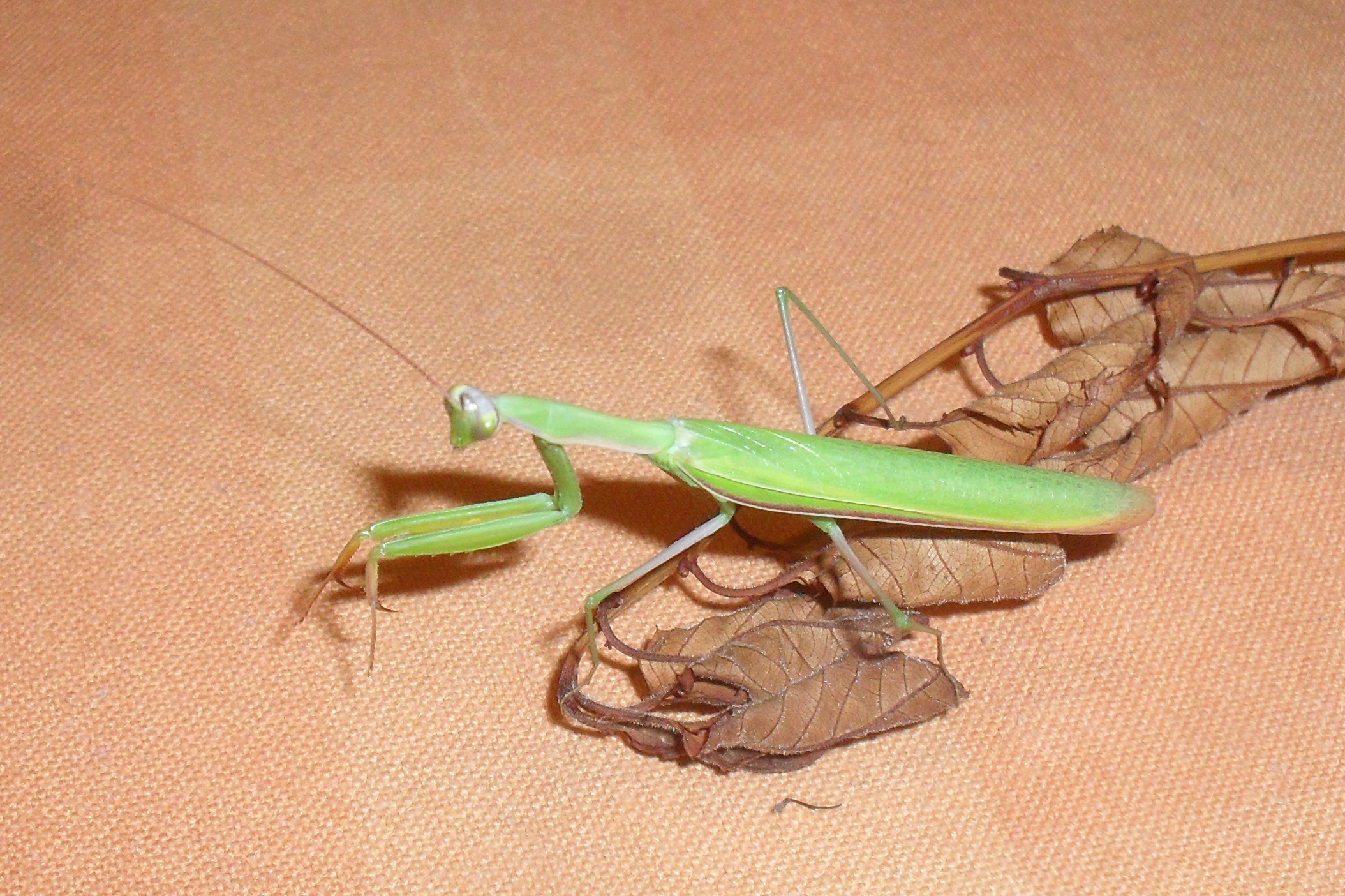 Männliches Tier in einer Wohnung in Rheinland Pfalz zugeflogen.